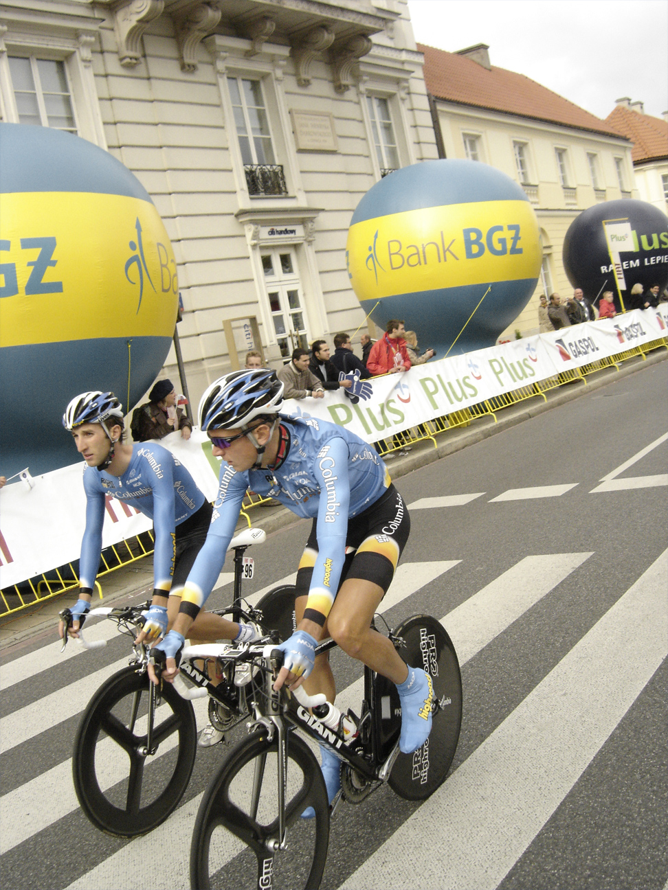 Kolarze grupy Team Columbia na Tour de Pologne 2008